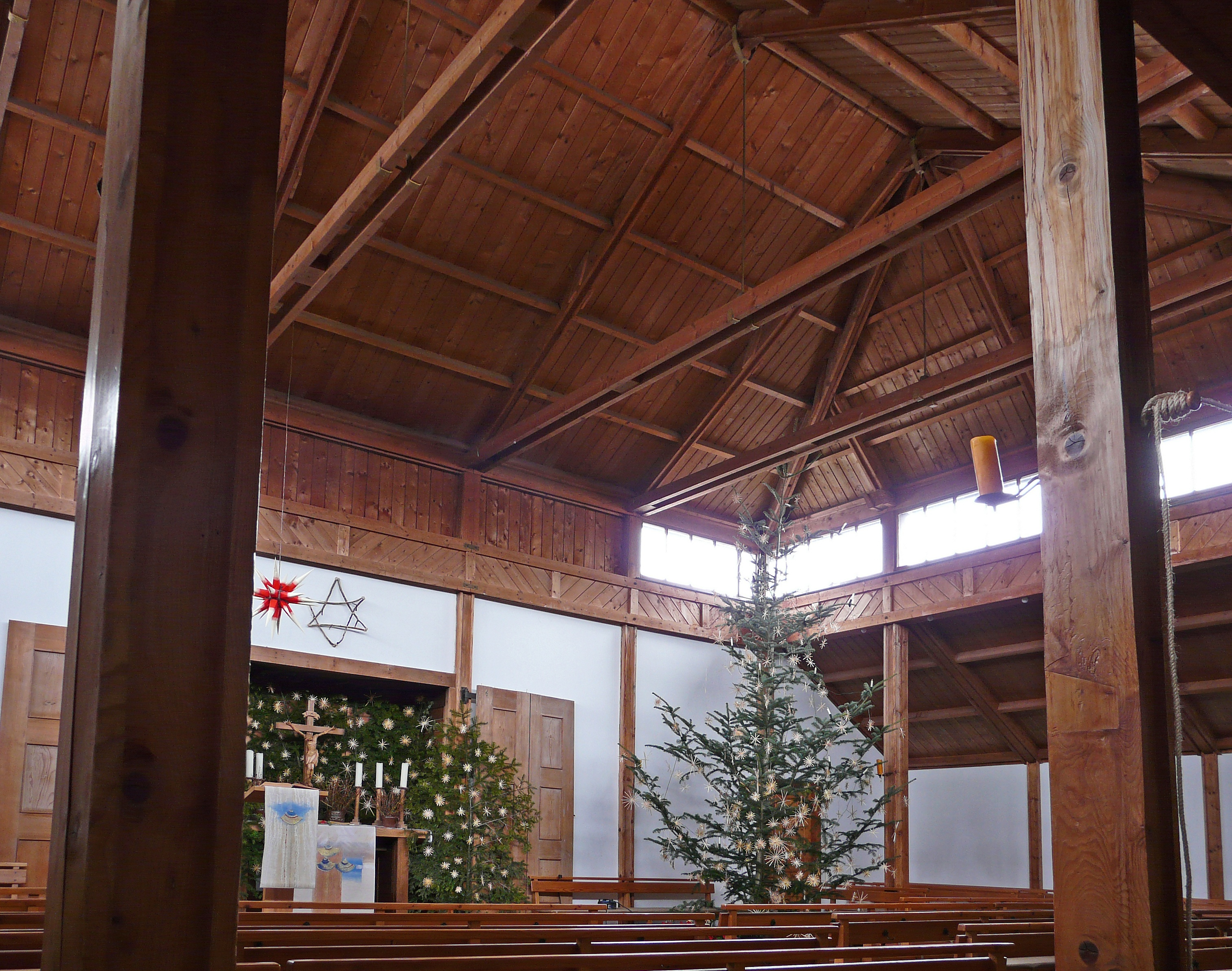 Innenansicht der Christuskirche in Viechtach (Bayerischer Wald), eines Gemeindezentrums ("Notkirche" Typ D) des Architekten Otto Bartning. Eingeweiht 1950.